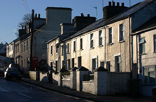 Upper Foxdale Cottages